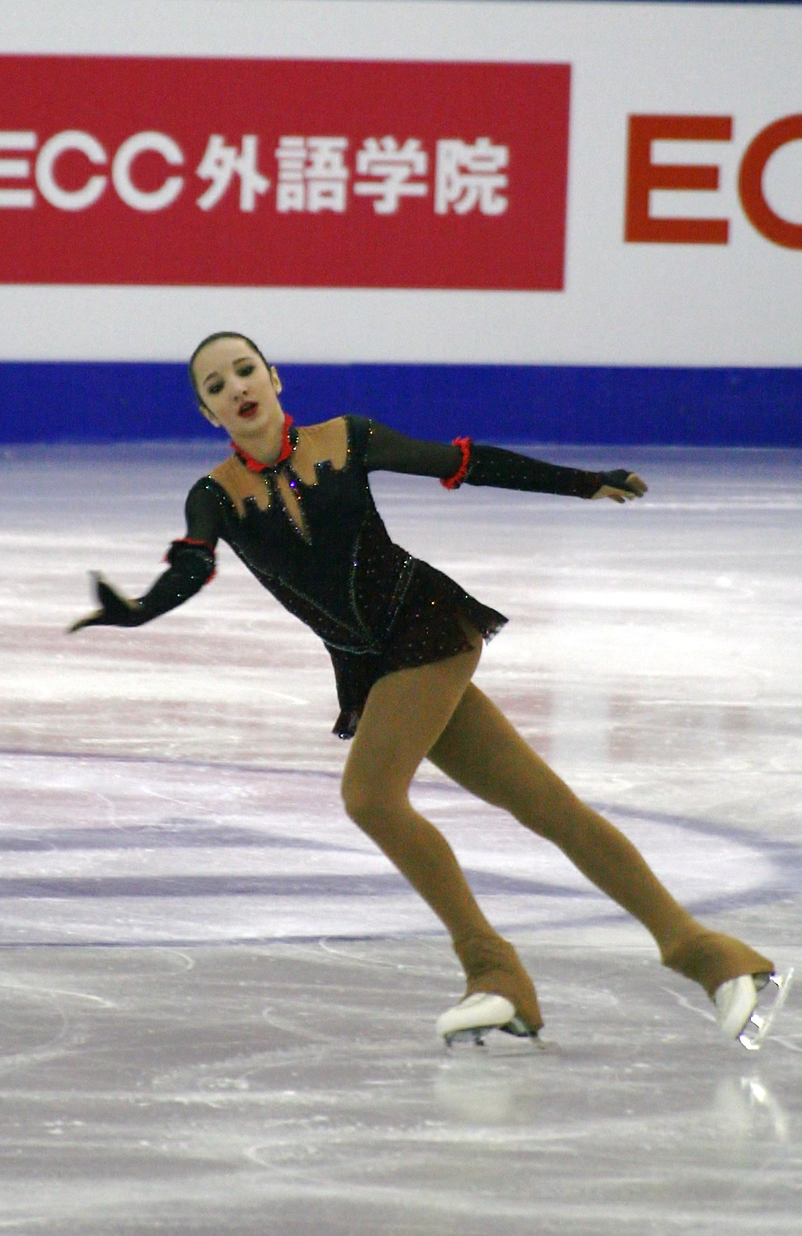 Полина Цурская (Россия) на финале Гран-при по фигурному катанию среди юниоров 2015-2016.